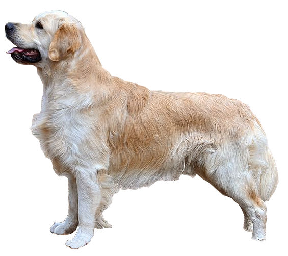 Retriever golden sur fond blanc